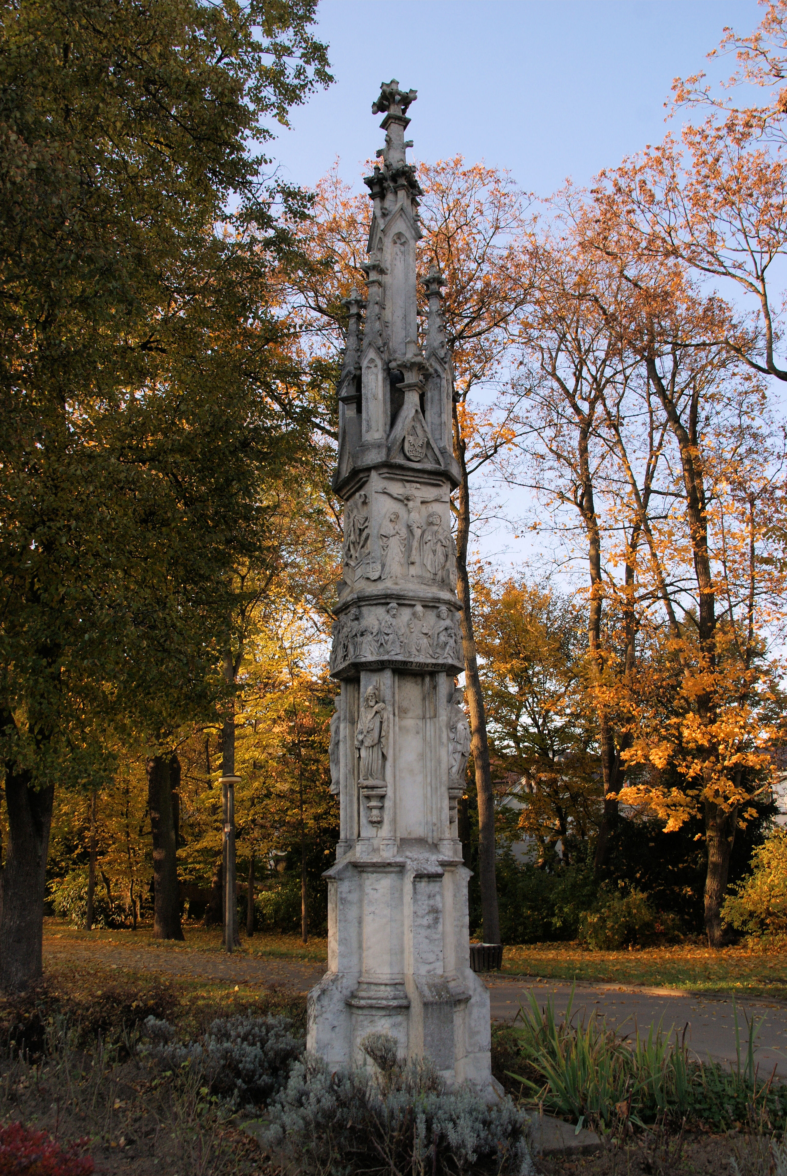 Wegsäule vor dem Jakobstor (sog. Pestsäule), polygonaler Schaft mit Figuren, Wimpergen und Fialen über gegliedertem Sockel, spätgotisch, 1459, um 1845/50 Restaurierung durch Ludwig Foltz This is a photograph of an architectural monument.